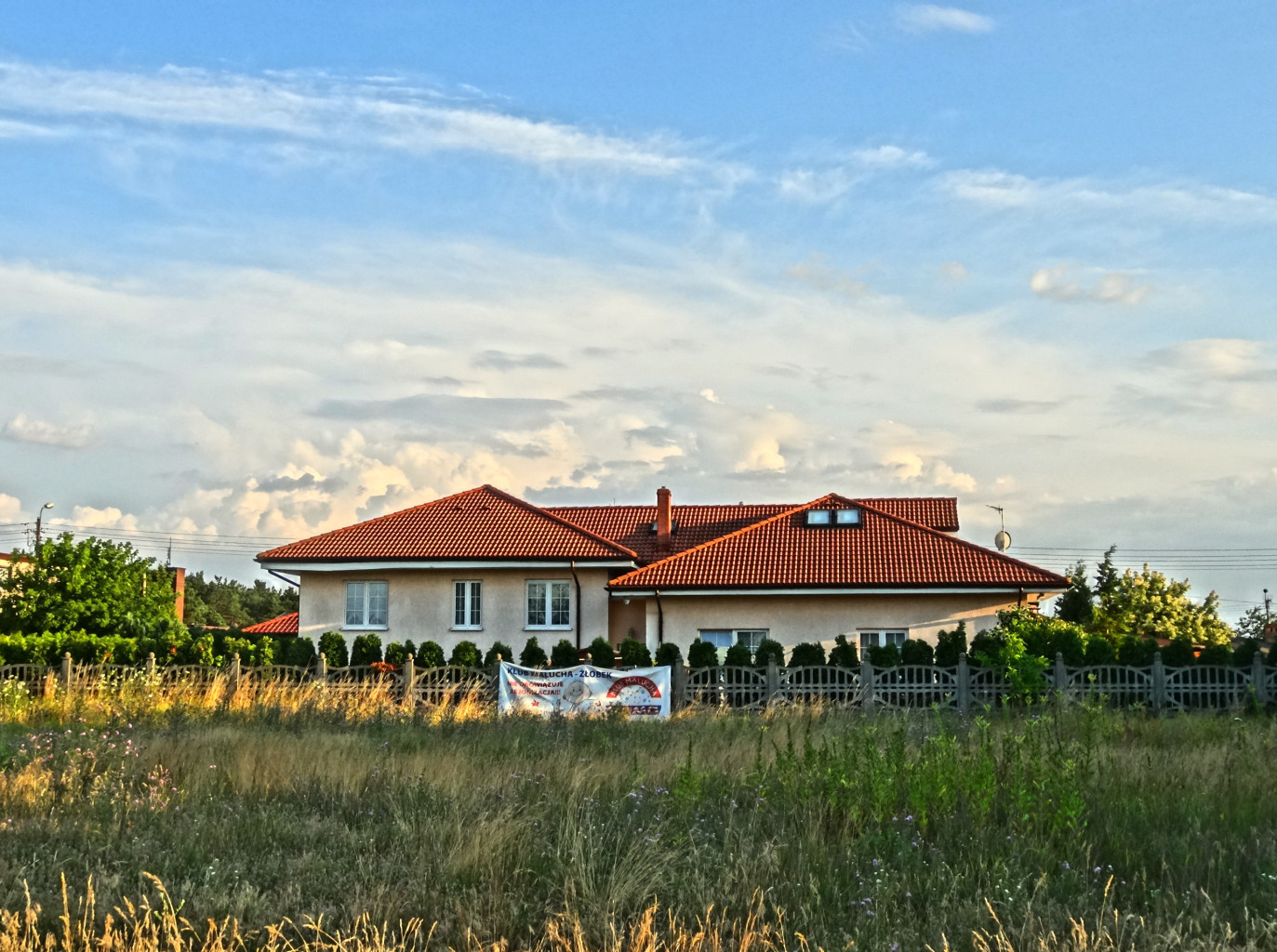 Białe Błota, powiat bydgoski, rejon ul. Czerskiej